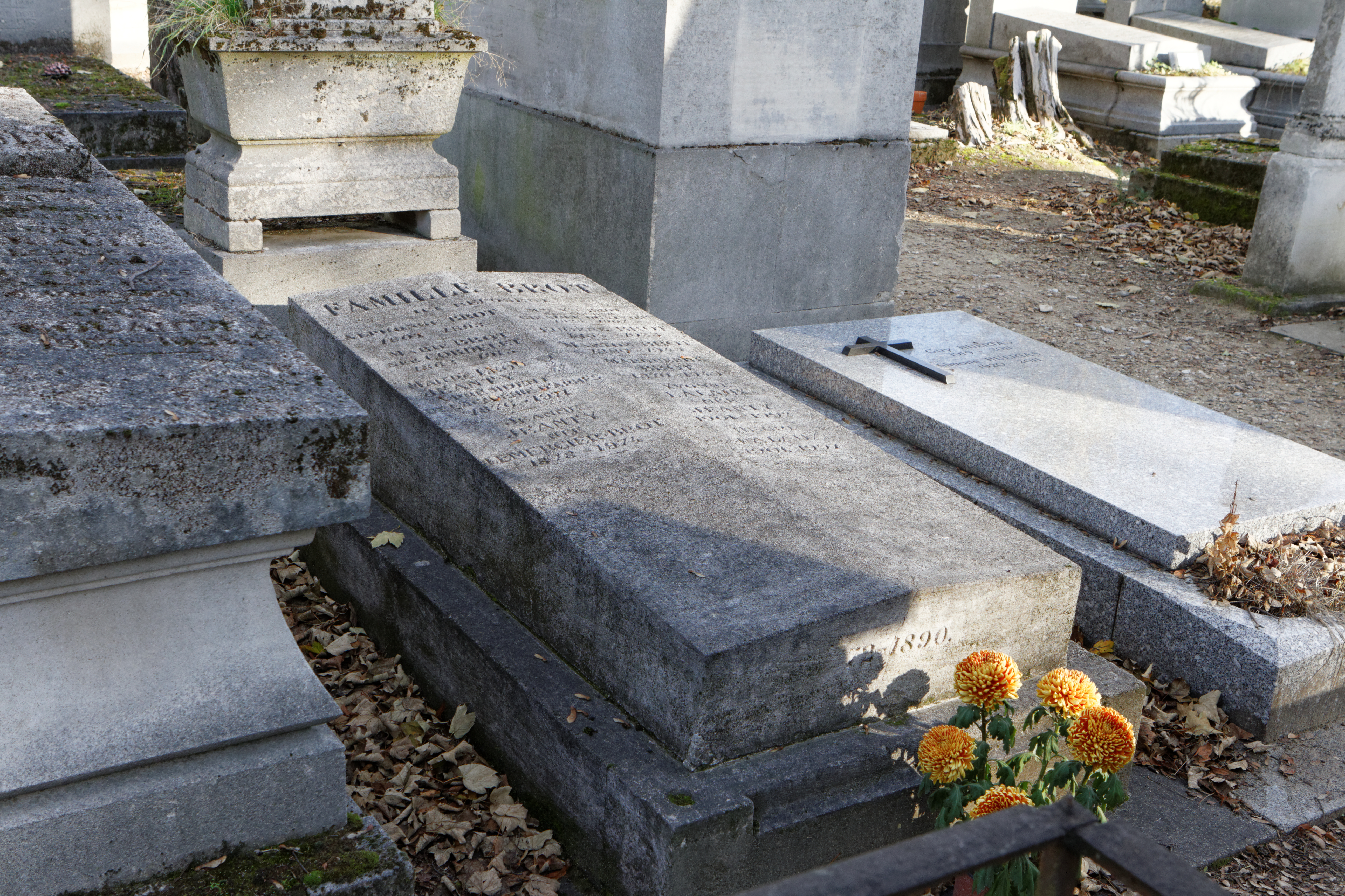 Sépulture d'Alphonse Brot (1807-1895), écrivain et auteur dramatique ; Eugène Brot (1854-1923), fils d'Alphonse Brot et chef du service des informations au Petit Journal ; Léon Jeanty (1876-1971), maitres d'armes au lycée Janson-de-Sailly, président de l'académie d'armes de France et créateur du challenge Jeanty qui deviendra une épreuve de la Coupe du Monde de fleuret dames ; .